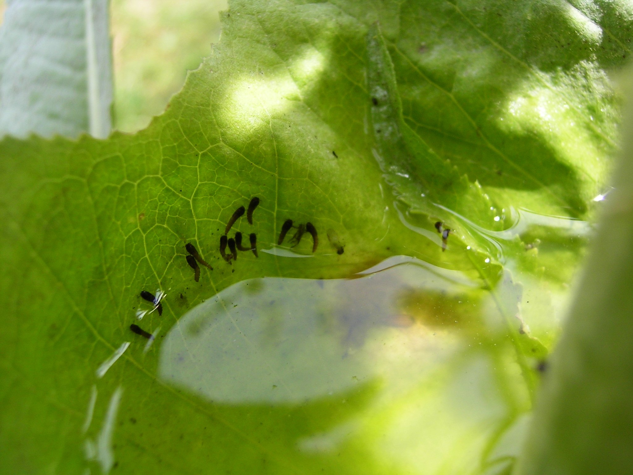 (en) Dipsacus fullonum Place: (de) Fliegenlarven an einer Wilden Karde (Dipsacus fullonum) Aufnahmeort: Bearbeitung: keine